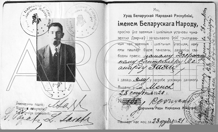 Дыпламатычны пашпарт Леанарда Зайца, дзяржаўнага кантралёра Рады БНР. 1920